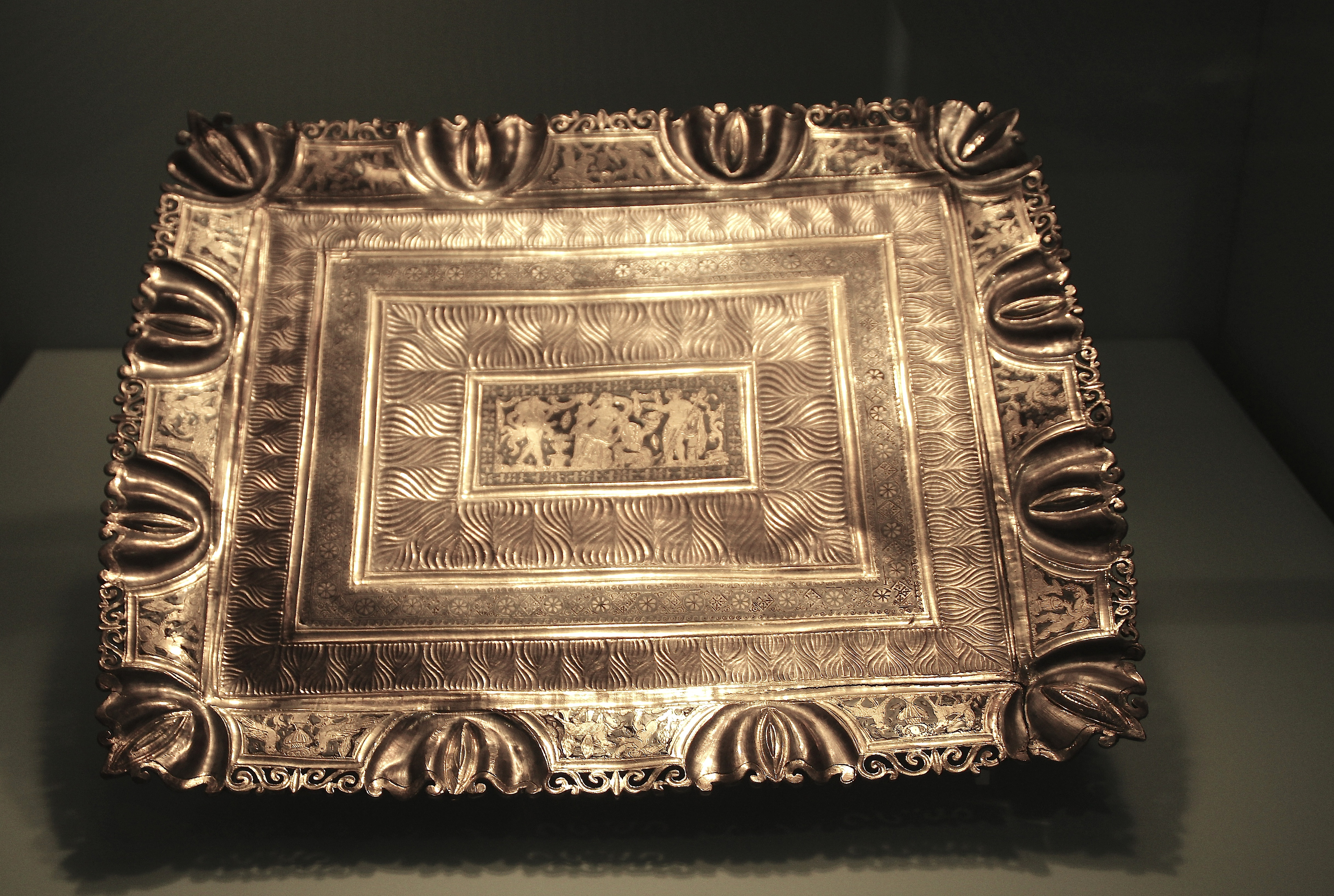 Ariadnetablett aus dem Silberschatz von Kaiseraugst